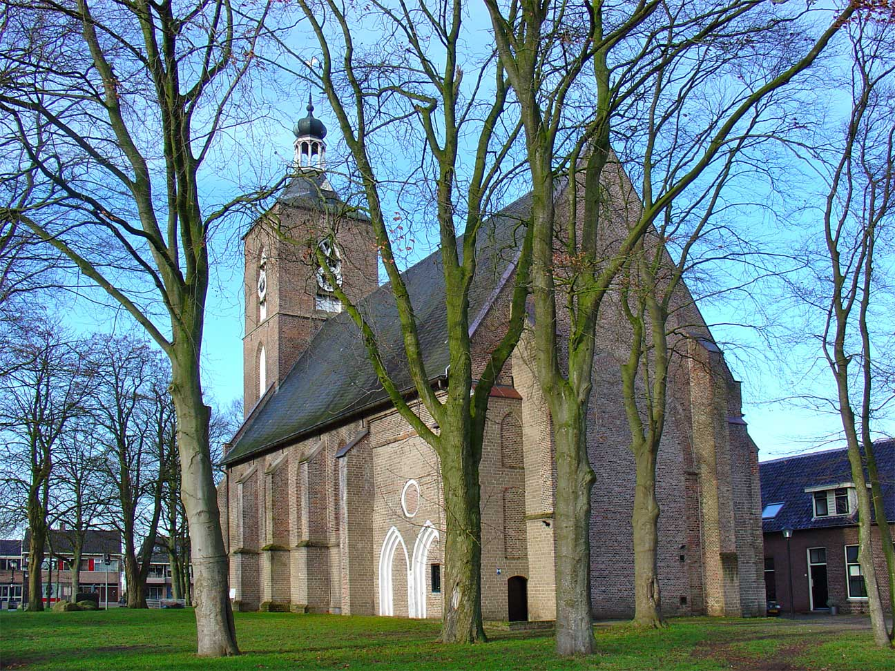 Mariakerk op de brink van Ruinen